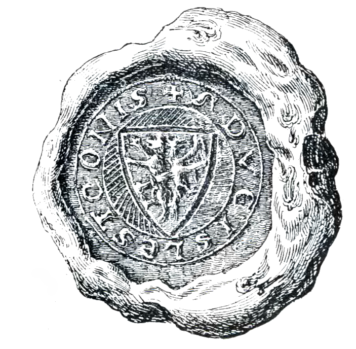 Leszek Inowrocławski seal